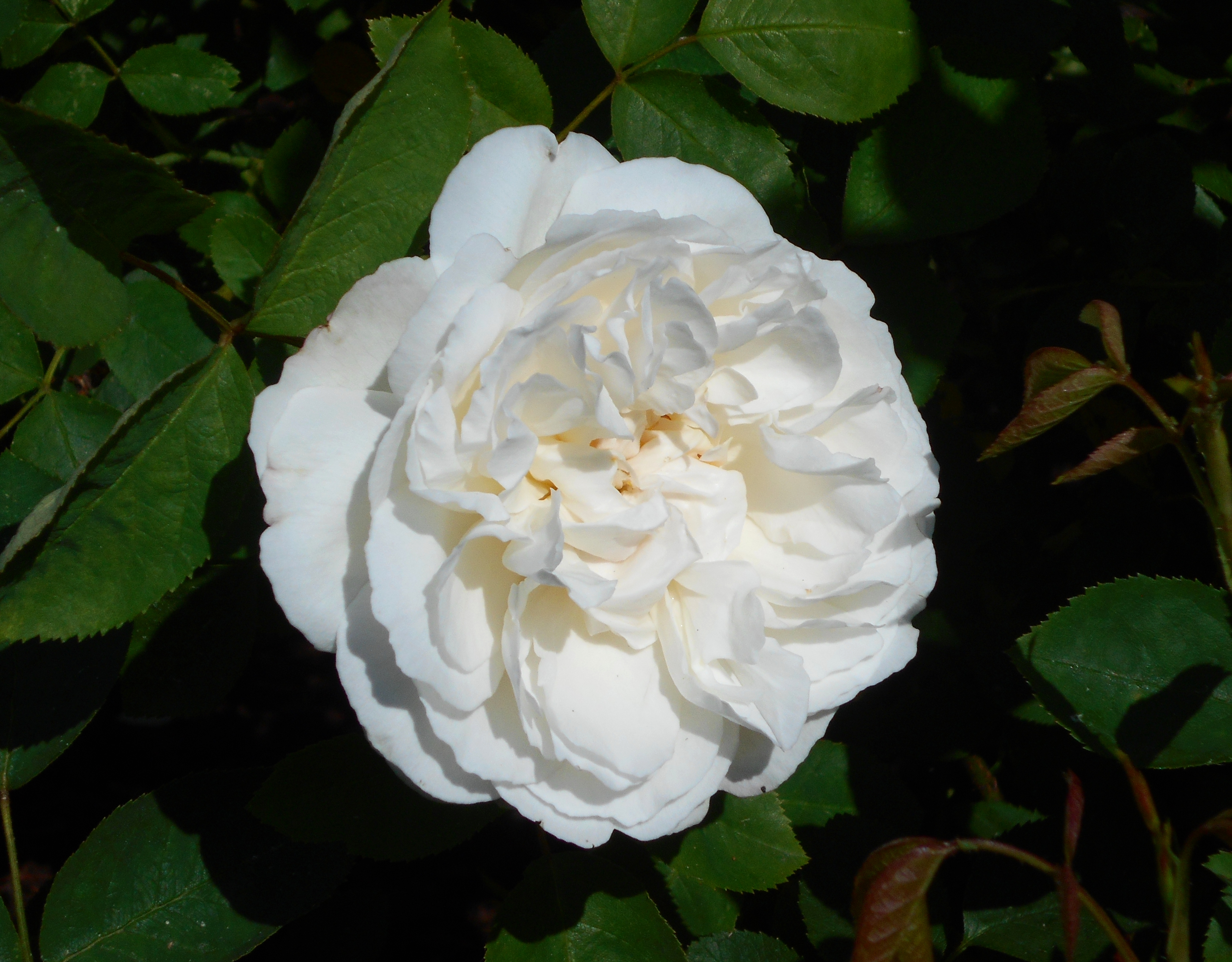 Rosa ‘Winchester Cathedral’, Botanischer Garten Berlin.